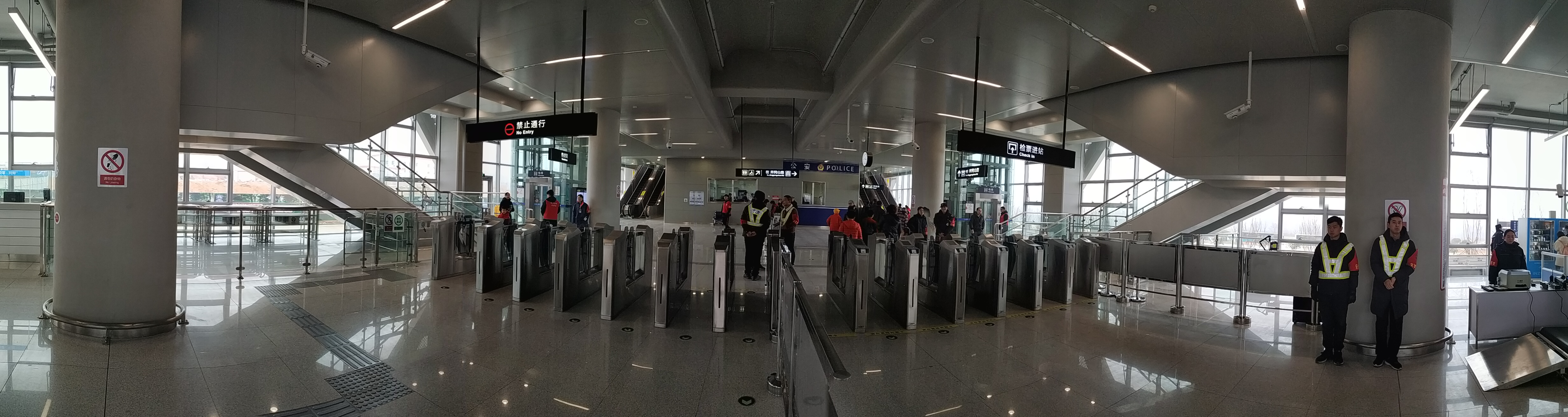 董家口站站厅